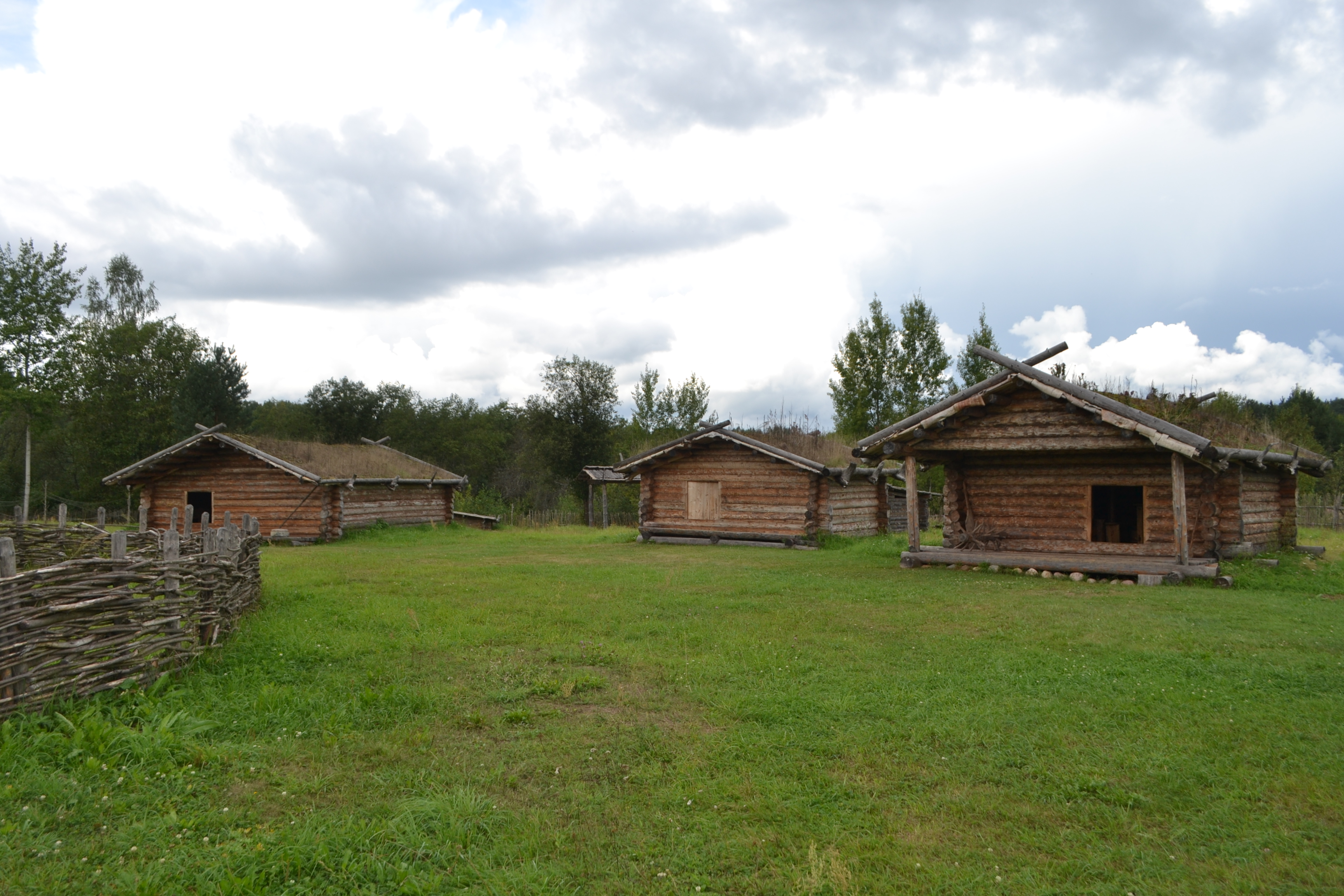 Фото экспозиции под открытым небом, которая представляет собой копию деревни древних славян